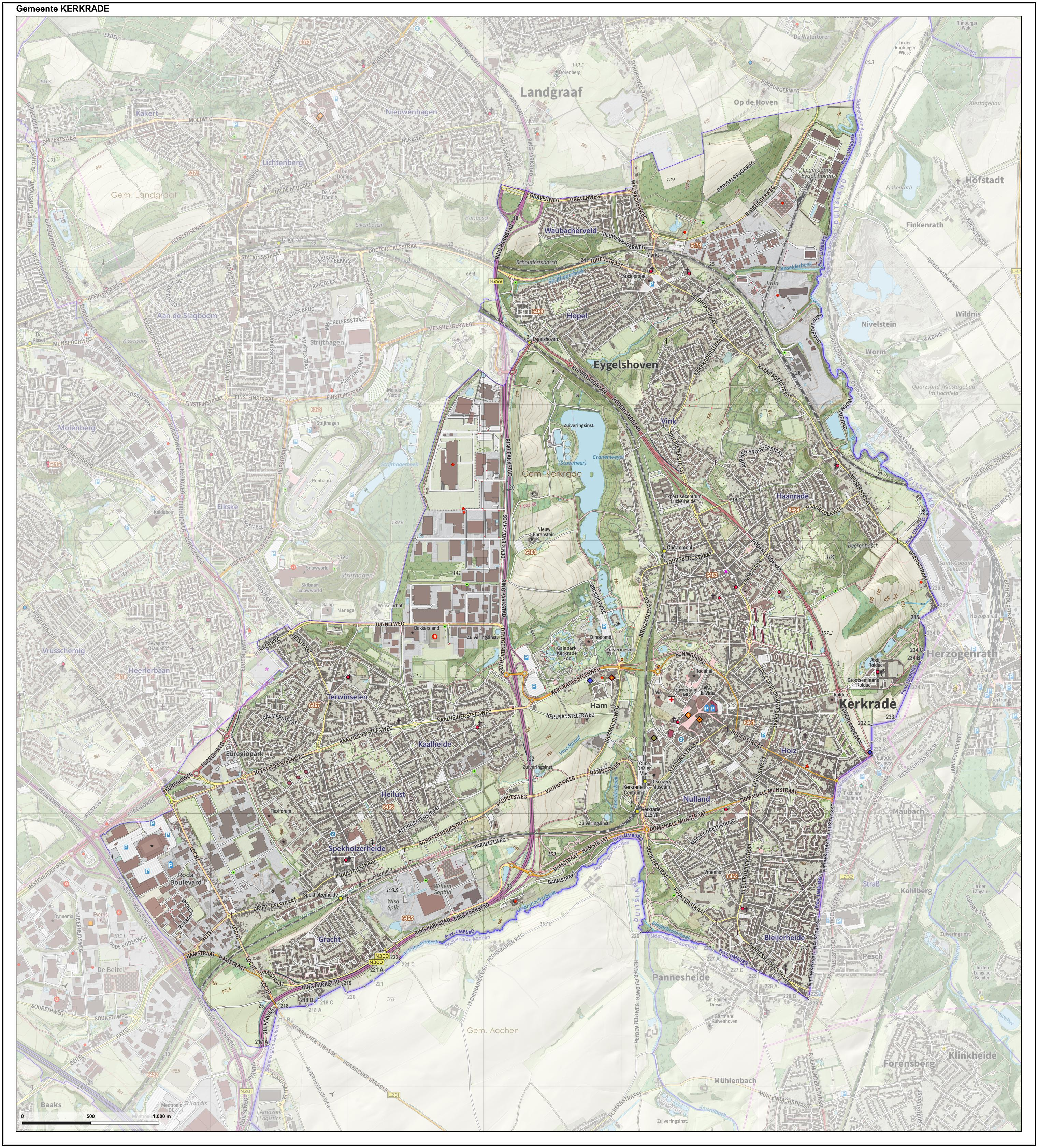 Topografische gemeentekaart. Resolutie: 400 pixels/km. Kaartbeeld samengesteld uit de open geodata van de Top10NL en Top25namen (Kadaster), Creative Commons-BY licentie. Gebouwvlakken uit open geodata BAG extract. Wegen uit de OpenStreetMap, OpenStreetMap community. Reliëfschaduw uit de Actuele Hoogtekaart AHN2. Samenstelling en kleurenschema: Jan-Willem van Aalst, met QGIS. Zie ook de Legenda.